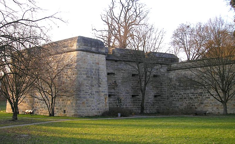 Festung Forchheim (Oberfranken). St. Veit-Bastion von Süden. Eigene Aufnahme, März 2006 / Fortress Forchheim (Upper Franconia, Germany). Bastion St. Veit. View from the south. Own photo, March 2006